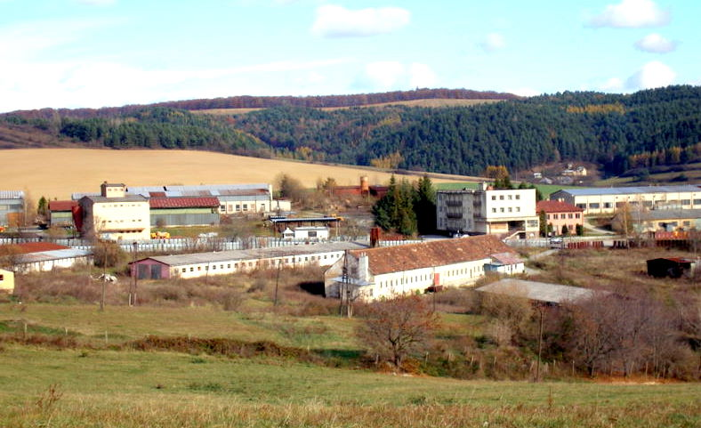 Areál poľnohospodárskeho družstva